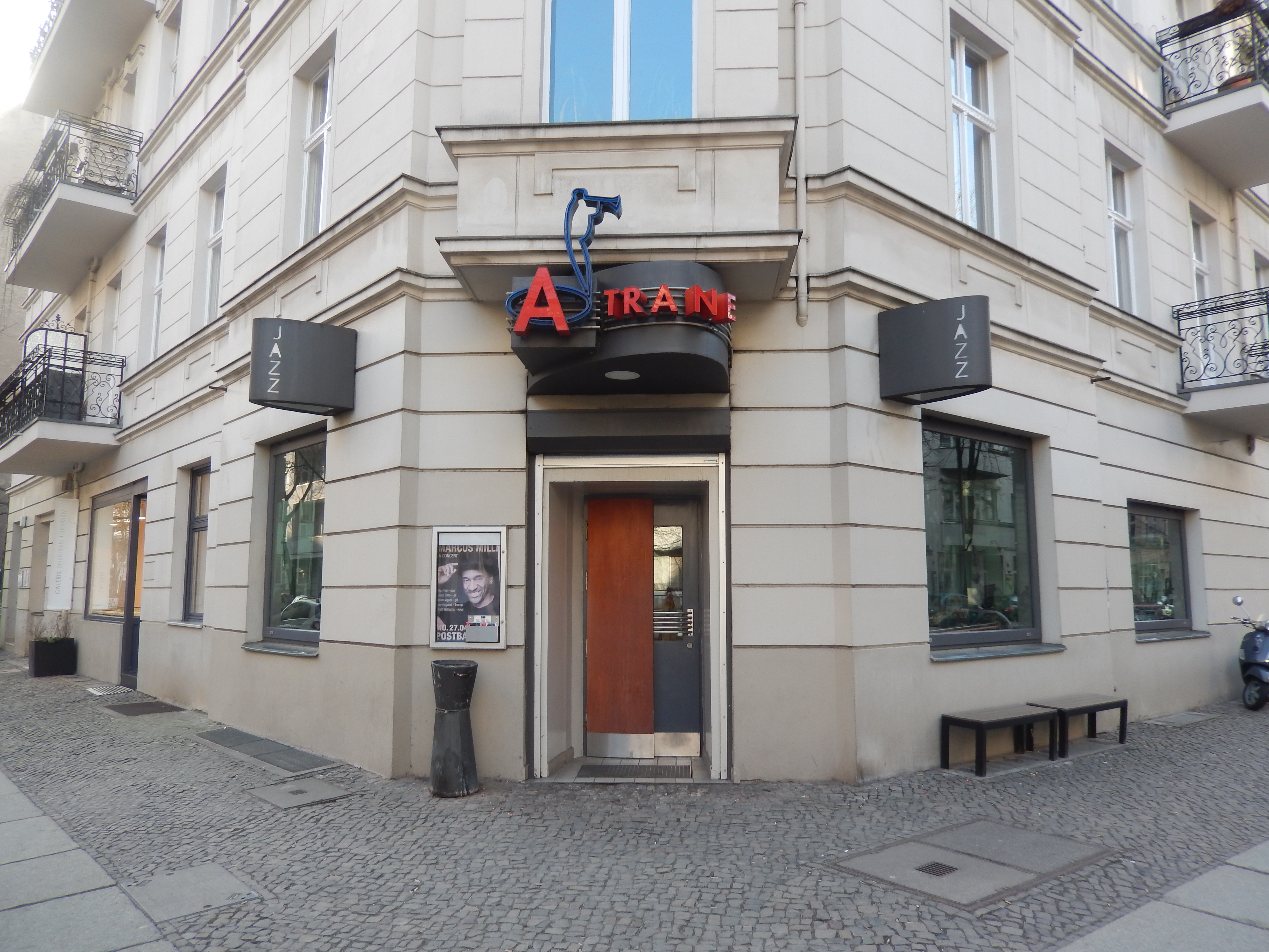 A-Trane in Berlin, Eingangsbereich Bleibtreustraße / Ecke Pestalozzistraße